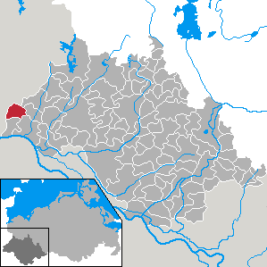 Schwanheide in Mecklenburg-Vorpommern - district Ludwigslust